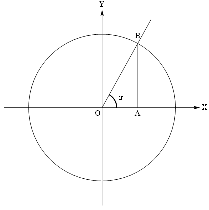 Եռանկյունաչափական ֆունկցիաներ